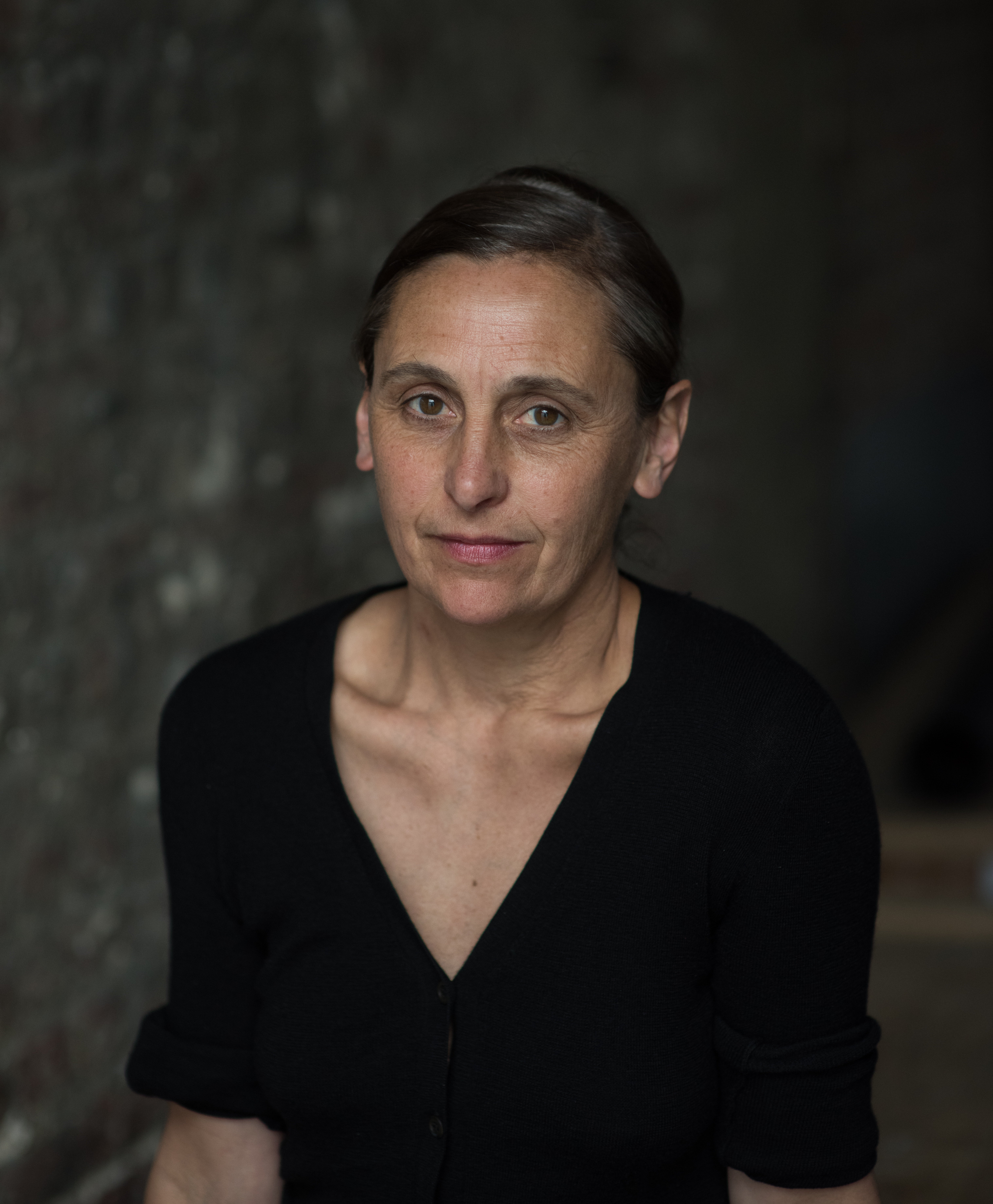 Portret van choreografe Anne Teresa De Keersmaeker gemaakt in 2016 door fotograaf Hugo Glendinning